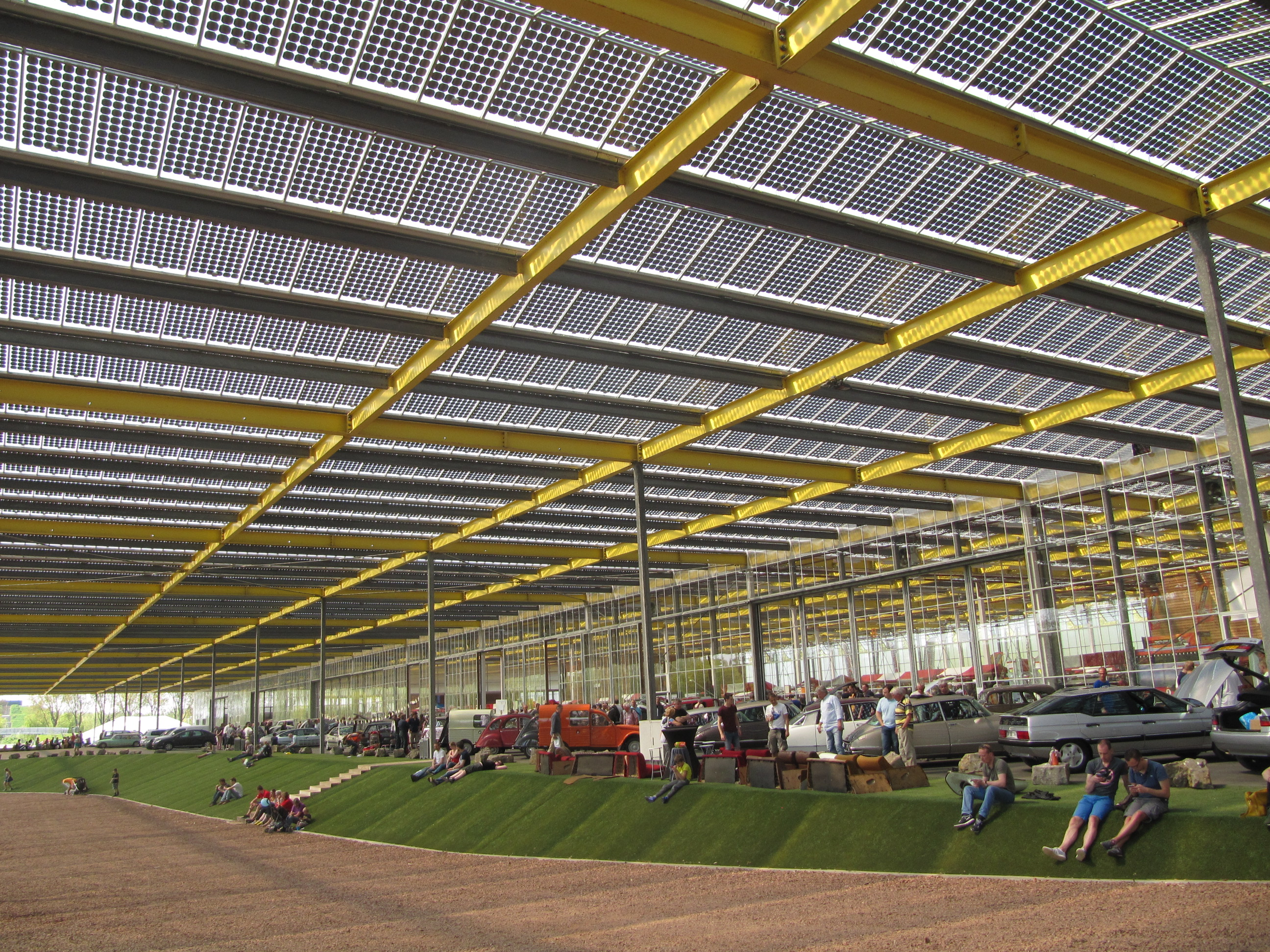 Floriade-gebouw, nu Expo Haarlemmermeer